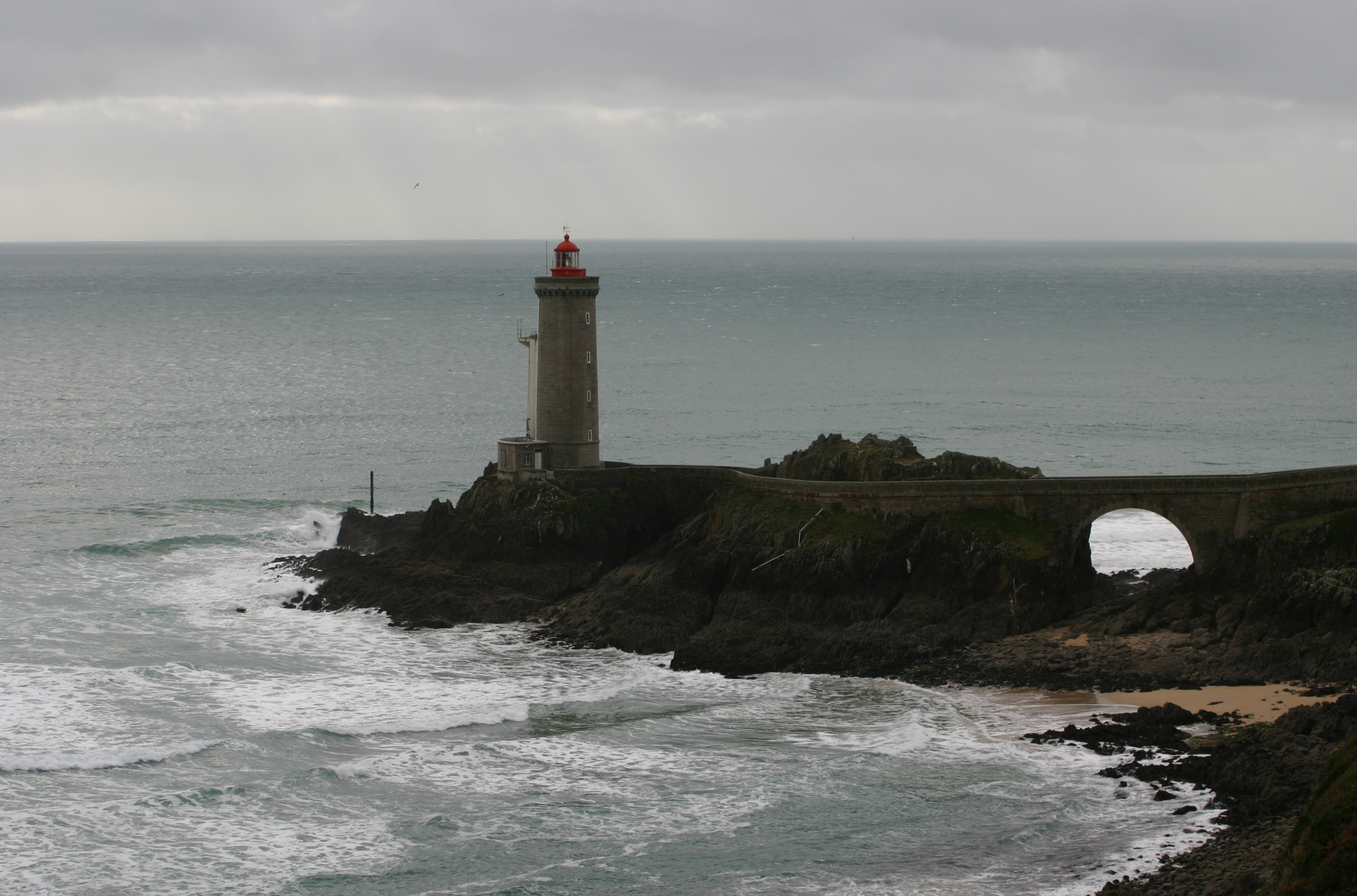 Phare du Petit Minou, entrée du Goulet de Brest